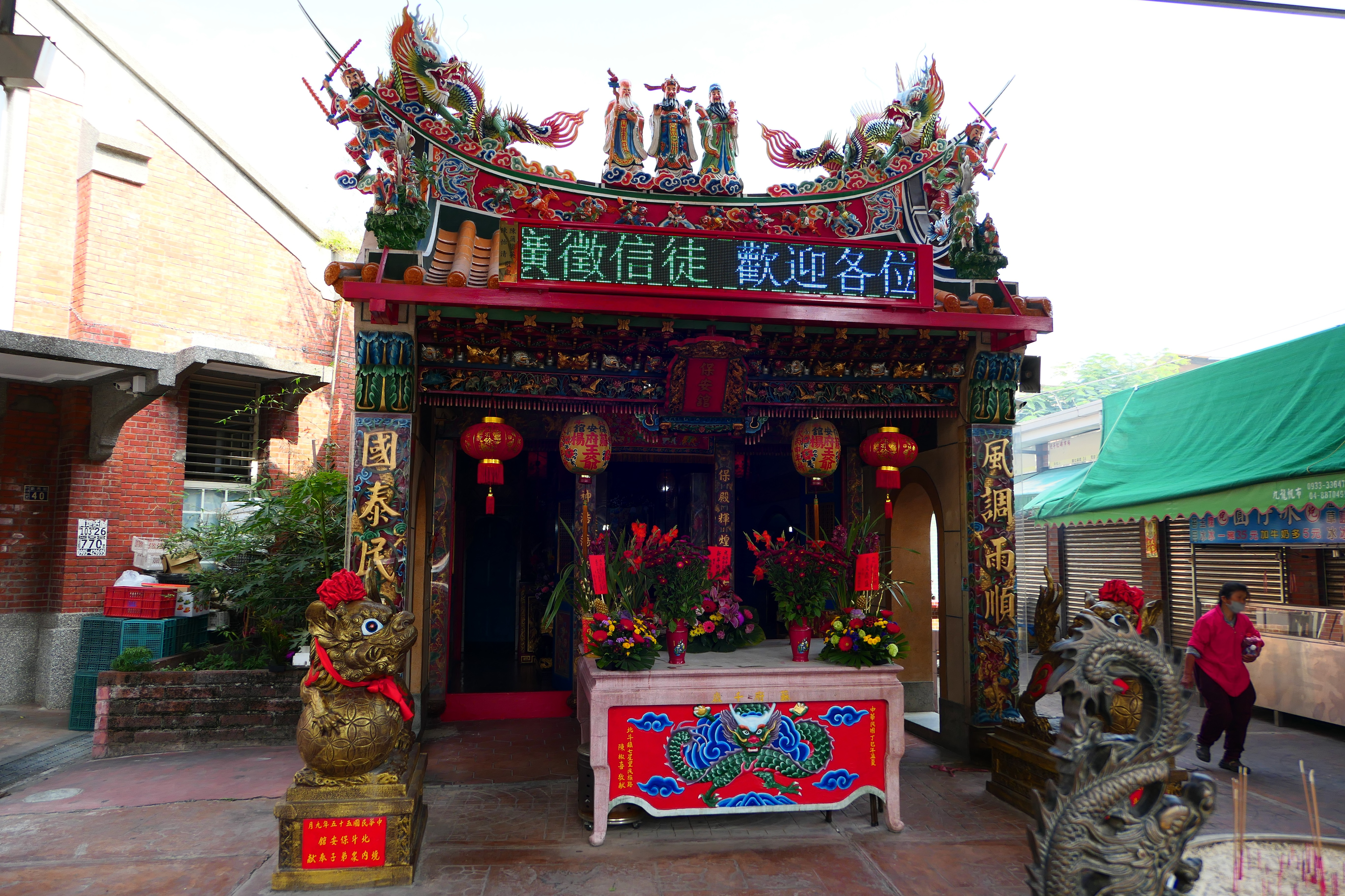 北斗保安館，位在北斗紅磚市場旁邊。